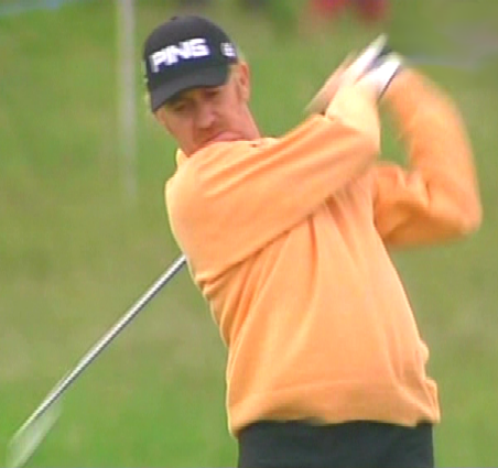 Bildbeschreibung: Miguel Angel Jiménez bei den Austrian Open 2006 Quelle: eigene Aufnahme mit einer Handycam Fotograf/Zeichner: Boss 11:12, 13 June 2006 (UTC) Datum: 10.6.2006 Sonstiges: GNU